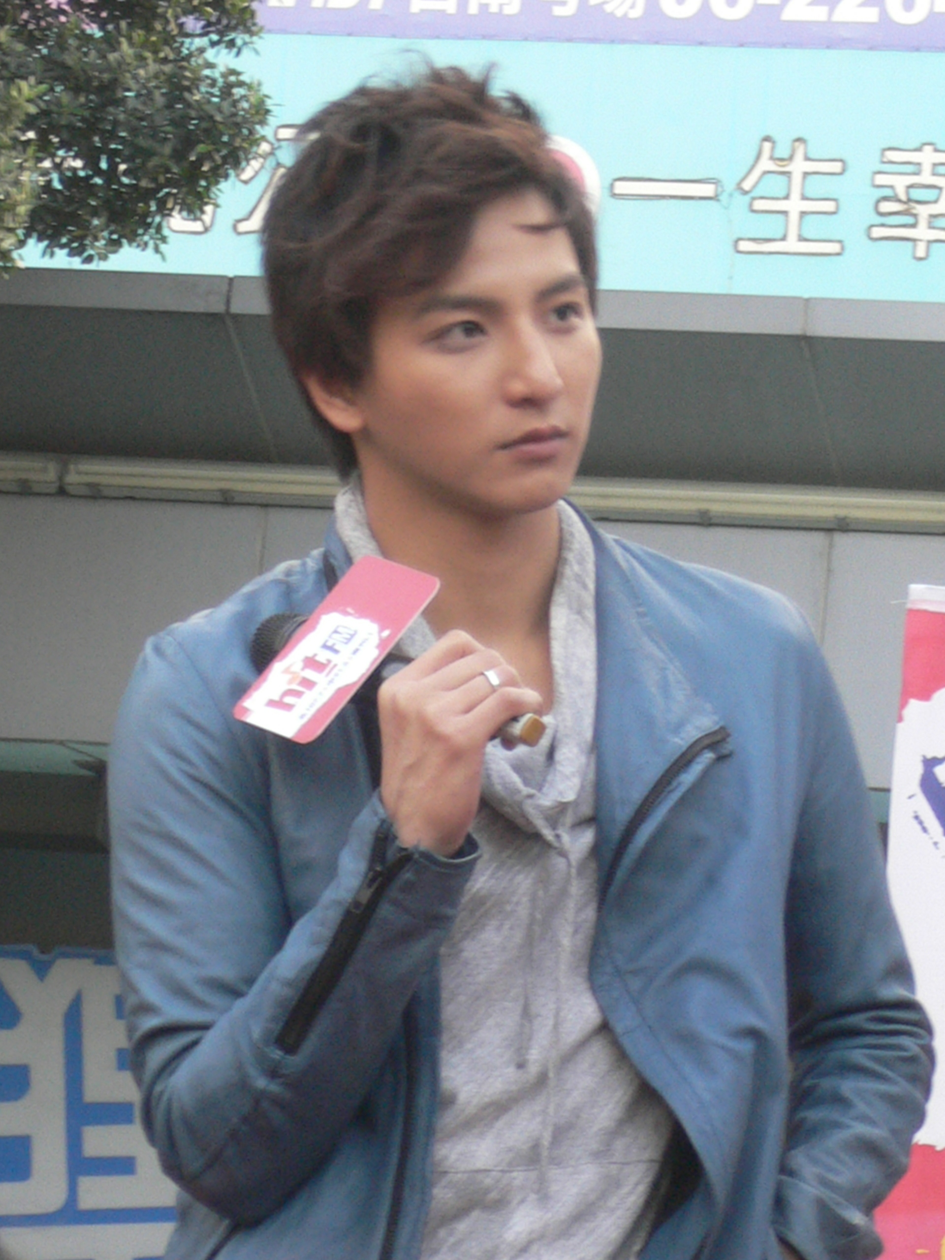 中文（台灣）: 小煜在台南南方公園的《四度空間》簽唱會